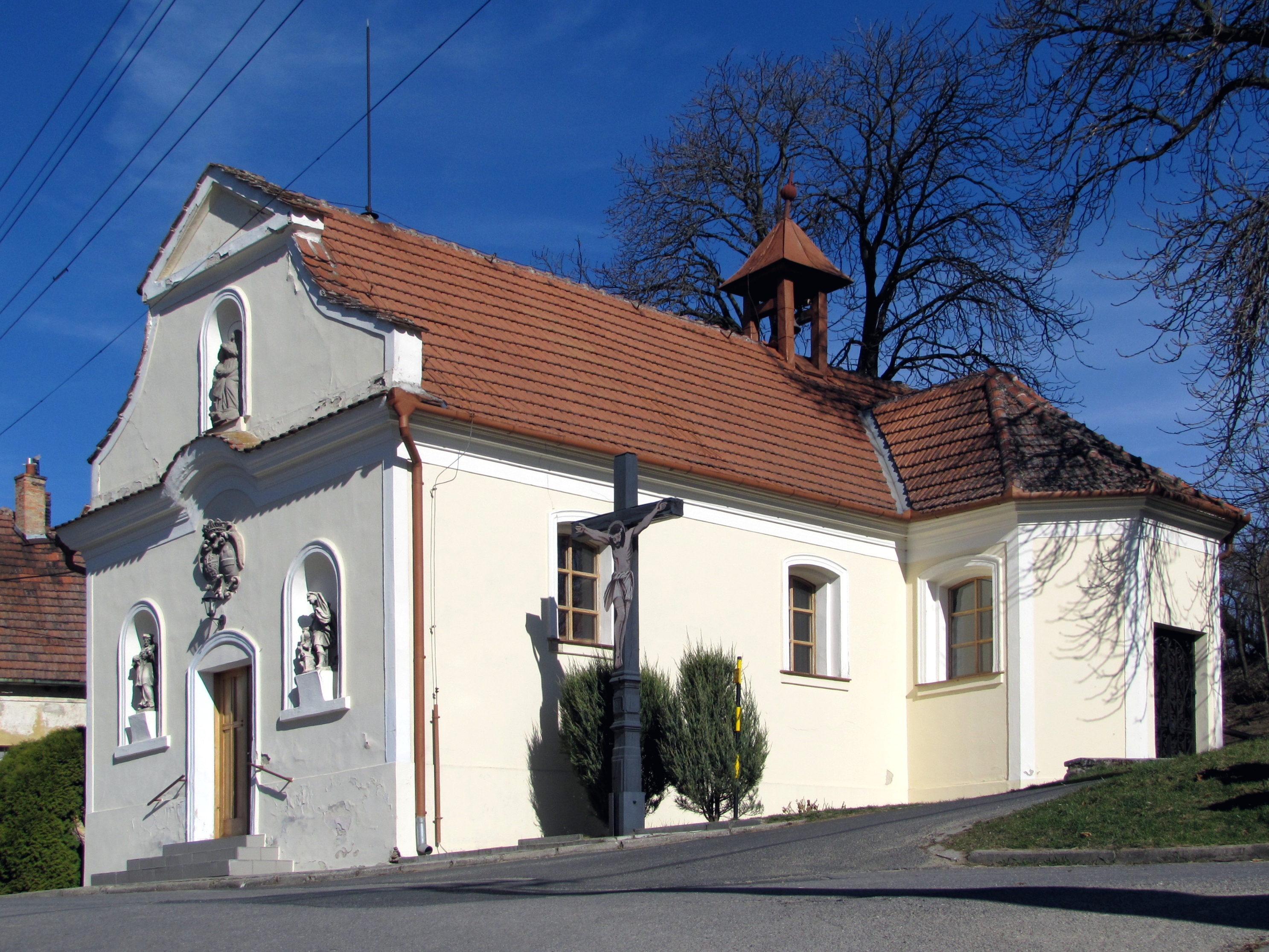 Barokní kaple Nejsvětější Trojice ve Strážovicích z let 1751-1753